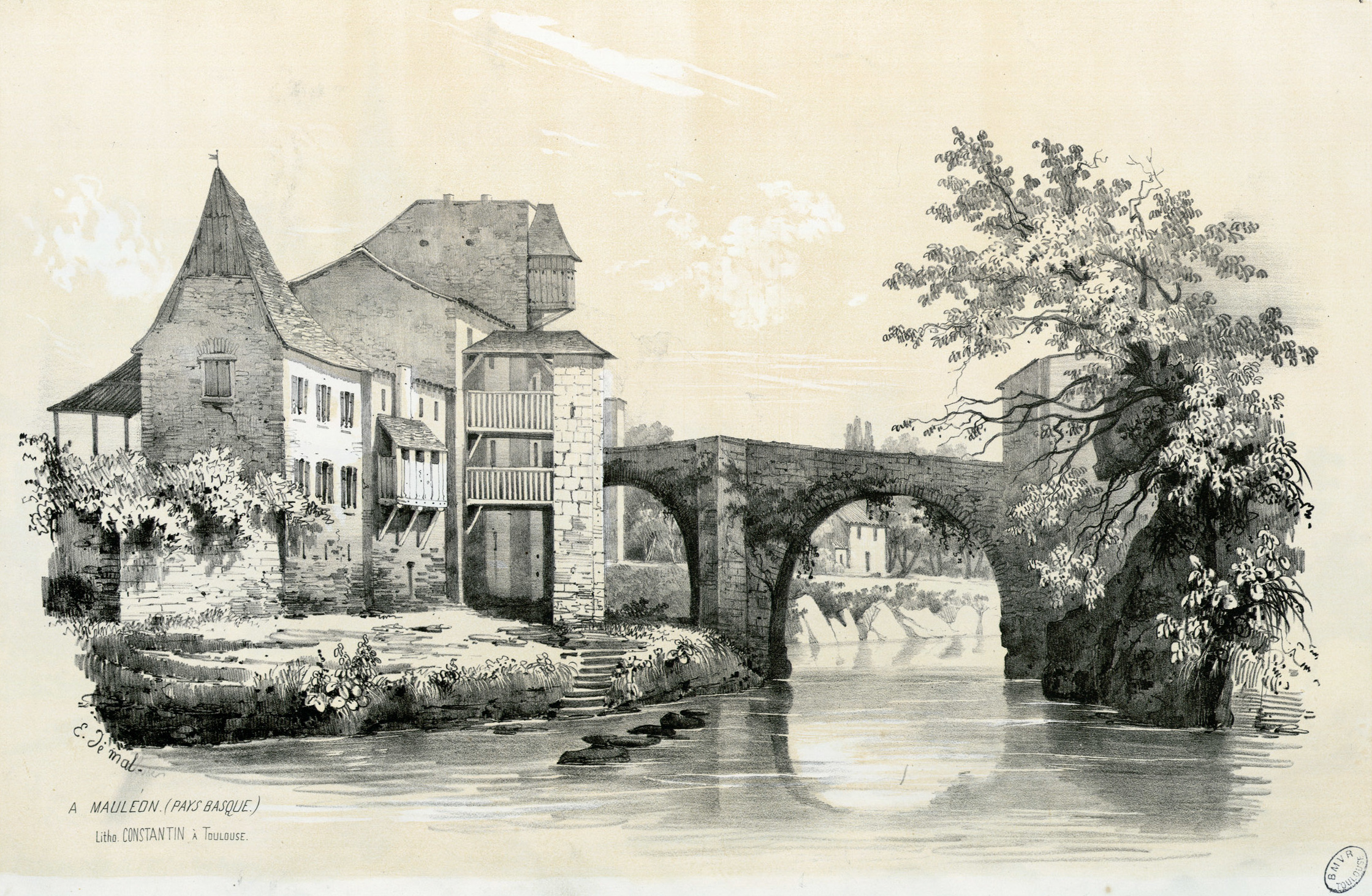 Fait partie d'un recueil de 15 planches lithographiées en camaïeu avec titre lithographié Ancely, René (1876 - 1966). Possesseur